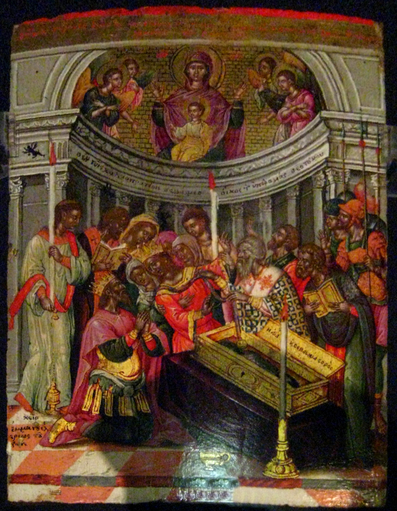 Эммануил Тзанес. Чудо святого Пояса. 2-я пол. 17 века. Музей Бенаки. Emmanuel Tzanes. The miracle of the Holy Girdle. Benaki museum